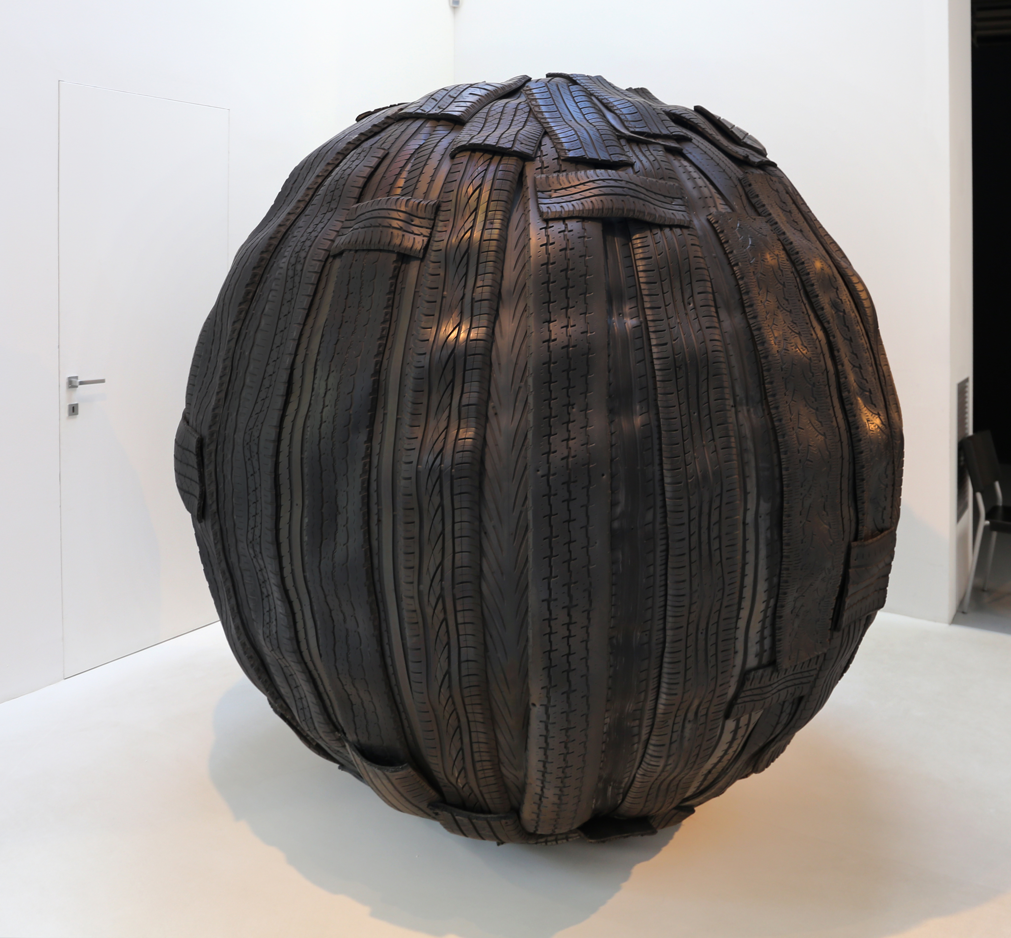 Centro per l'arte contemporanea Luigi Pecci This is a photo of a monument which is part of cultural heritage of Italy.